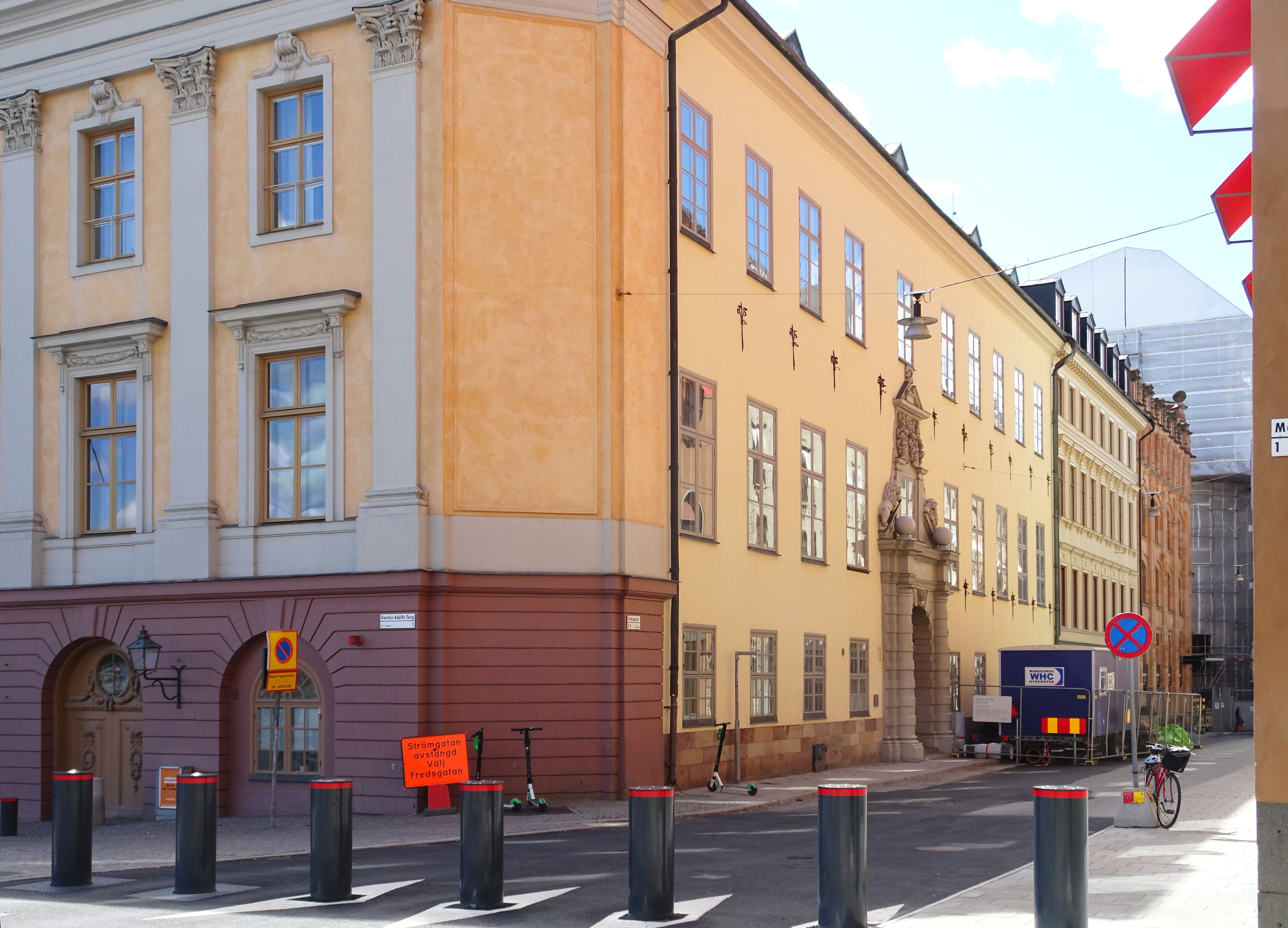 Arvfurstens palats, fasad mot Fredsgatan, i bakgrunden Kumlienska huset